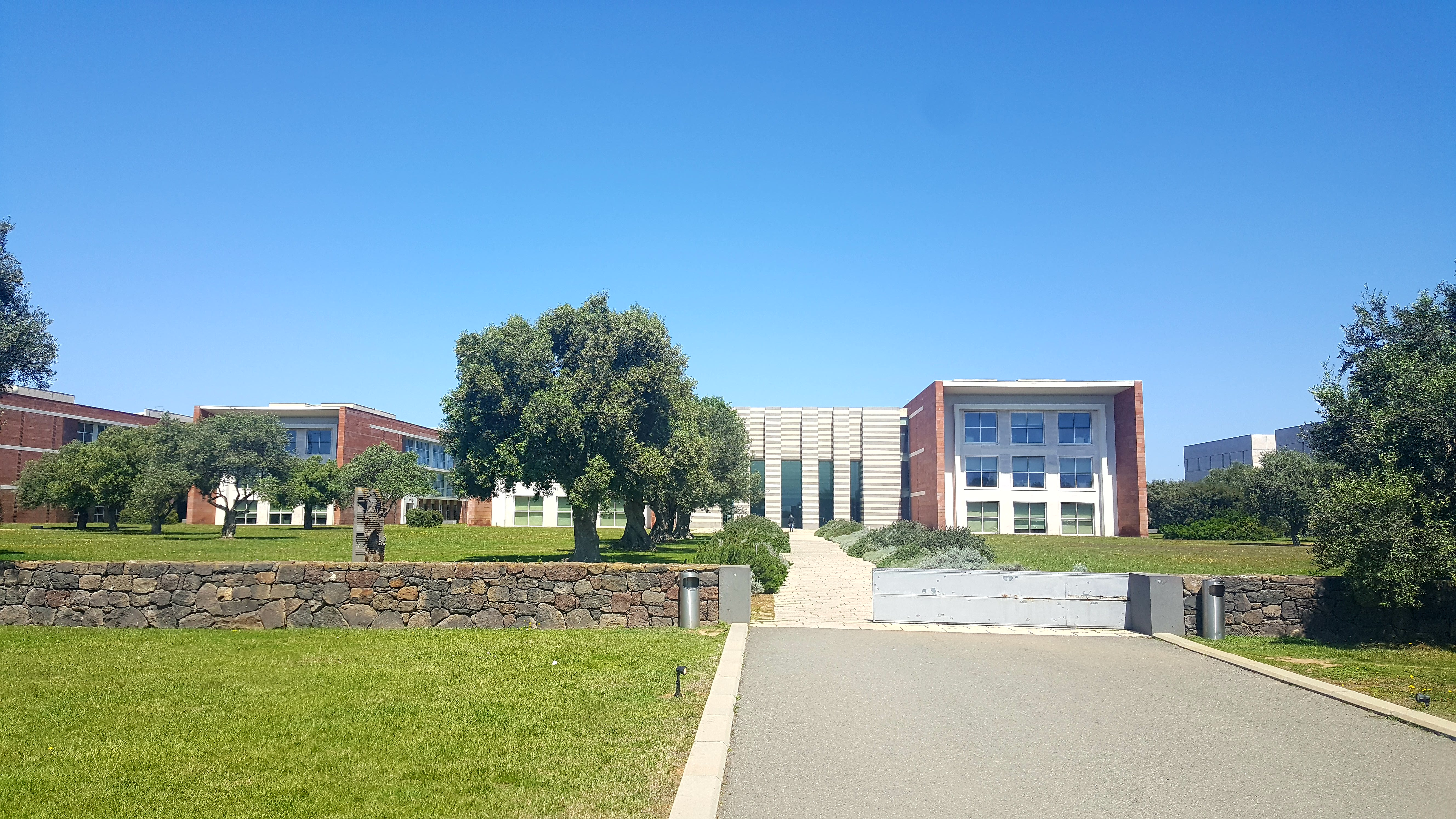 Sede di Tiscali in località Sa Illetta di Cagliari